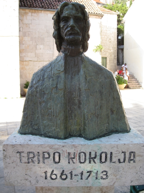 Фотография бюста, перед собором города Пераст (Черногория).